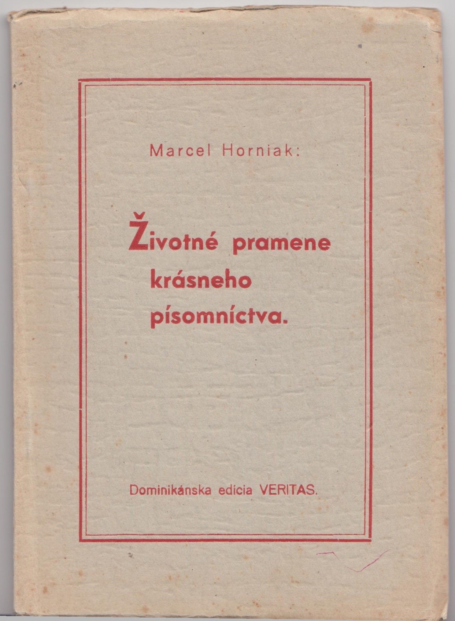 V r. 1946 saleziánovi Marcelovi Horniakovi vyšla v dominikánskej edícii Veritas knižná štúdia Životné pramene krásneho písomníctva.